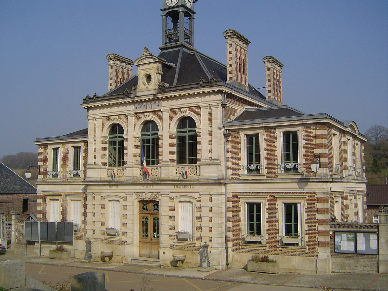 Maraye-en-Othe - La mairie